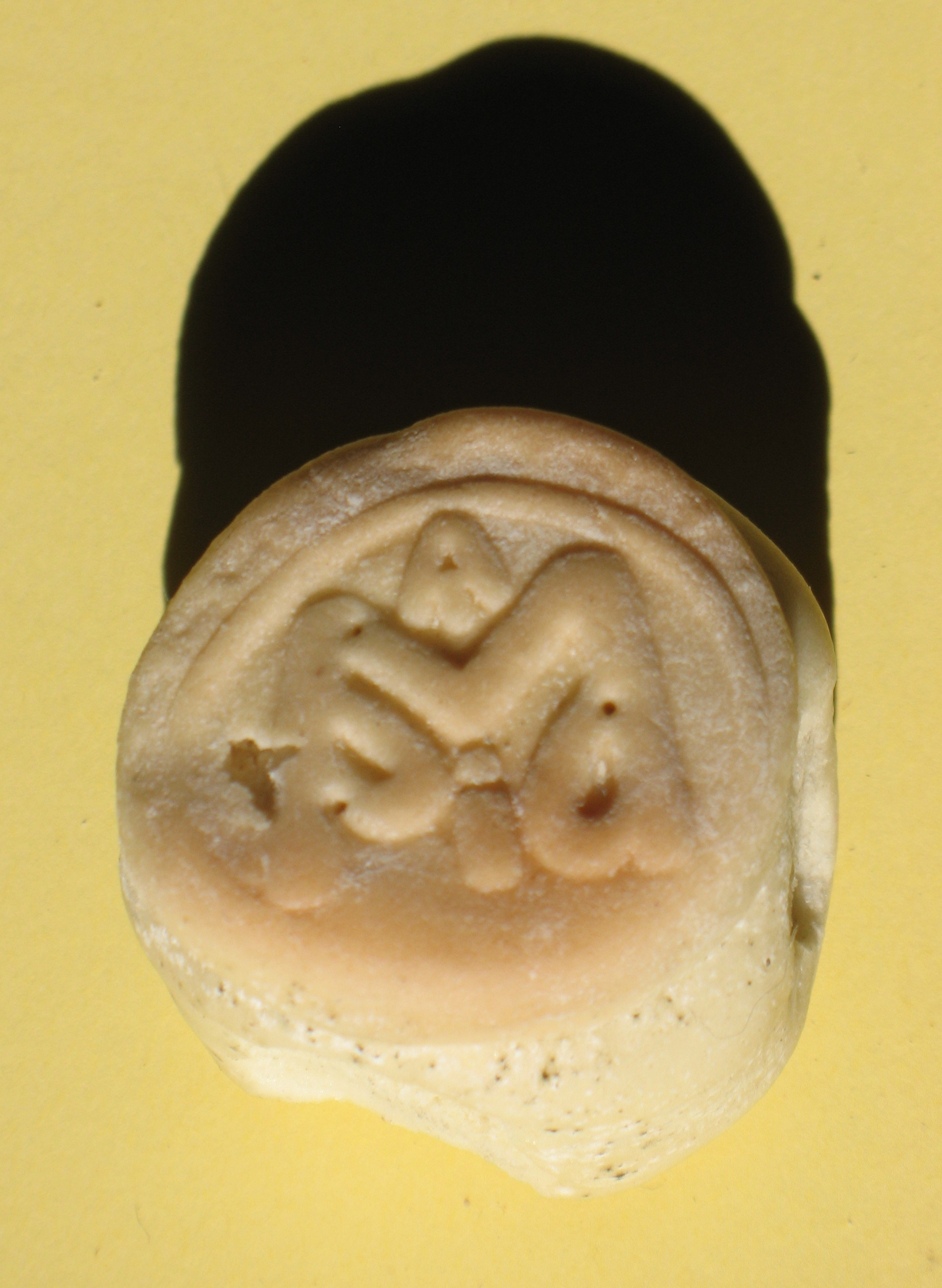 Orthodoxy Prosphora (Maria) in Kharkov. Православная просфора Пресвятой Девы Марии (Харьков).